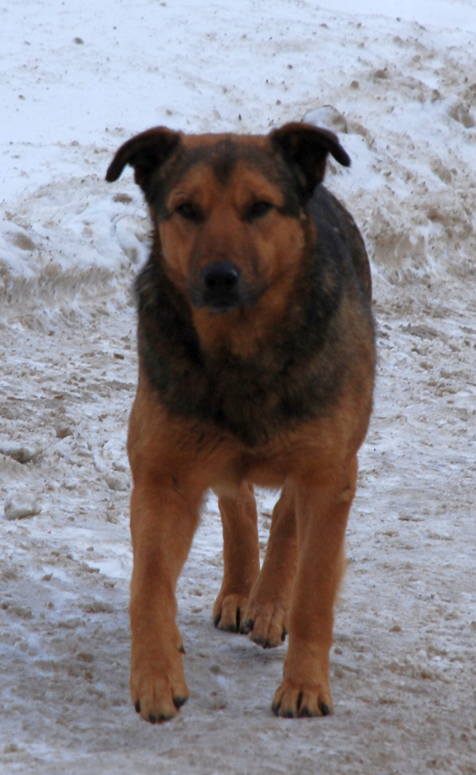 Уверенной походкой